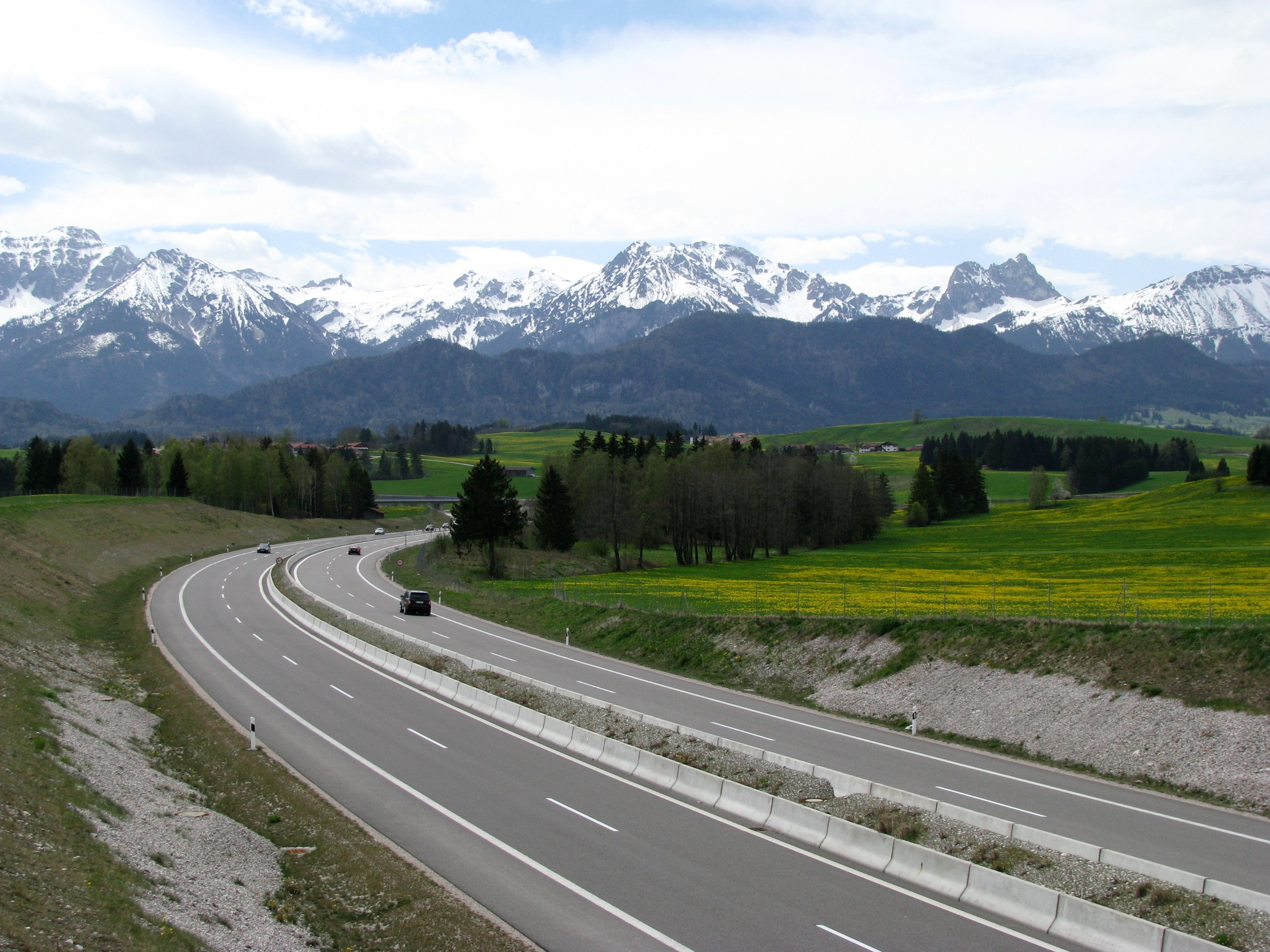 Bundesautobahn 7 bei Hopferau, kurz vor ihrem Ende bei Füssen